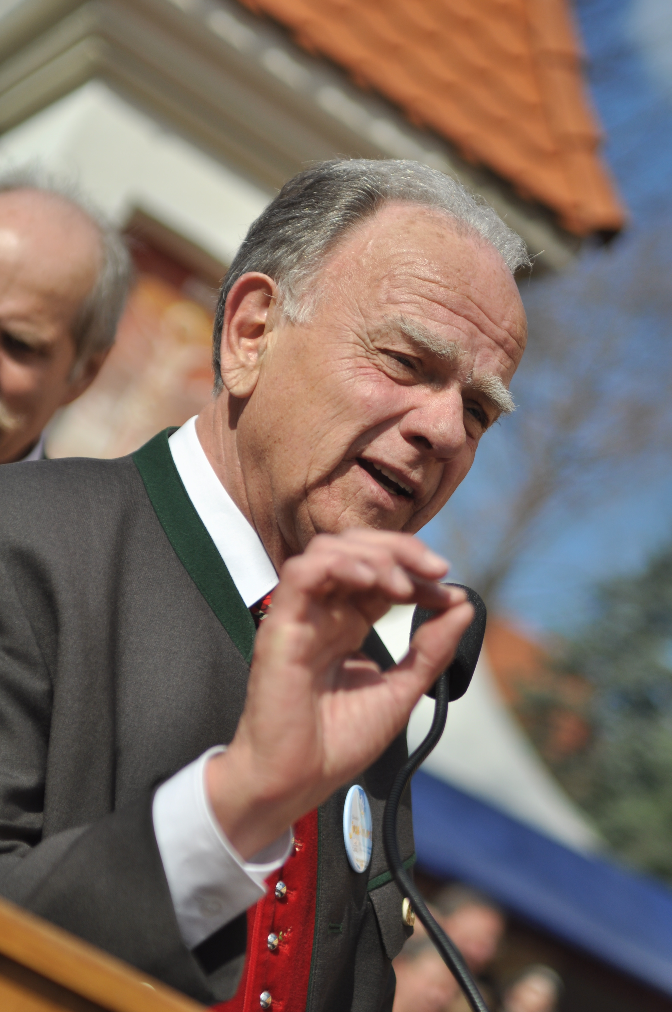 Der ehemalige Präsident des österreichischen Bundesrates Josef Pfeifer bei einer Rede anlässlich des Josefimarktes in Eberndorf (Kärnten).